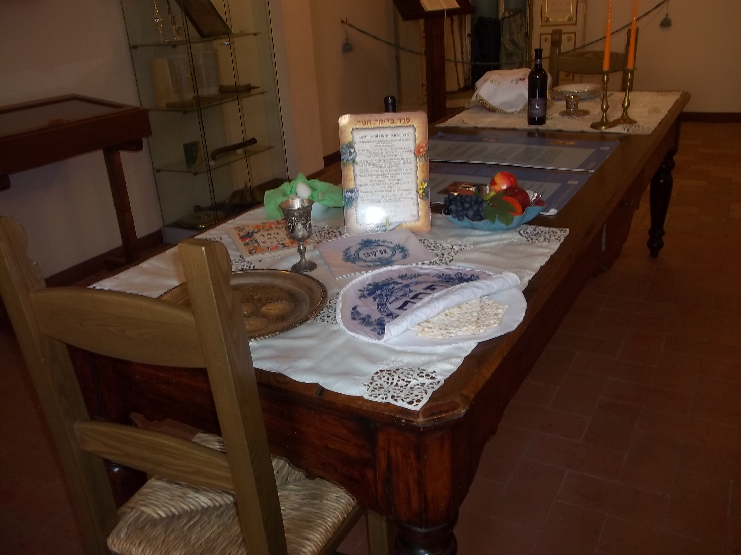 המוזיאון העברי על-שם פאוסו לוי ובית הכנסת בעיר סריאנה